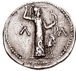 Kleomenes III. 235-221 BC